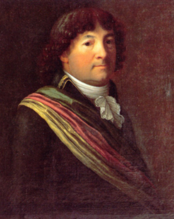 Peter Ochs (* 20. August 1752, Nantes; † 19. Juni 1821, Basel) in der Amtstracht eines Direktors der Helvetischen Republik.